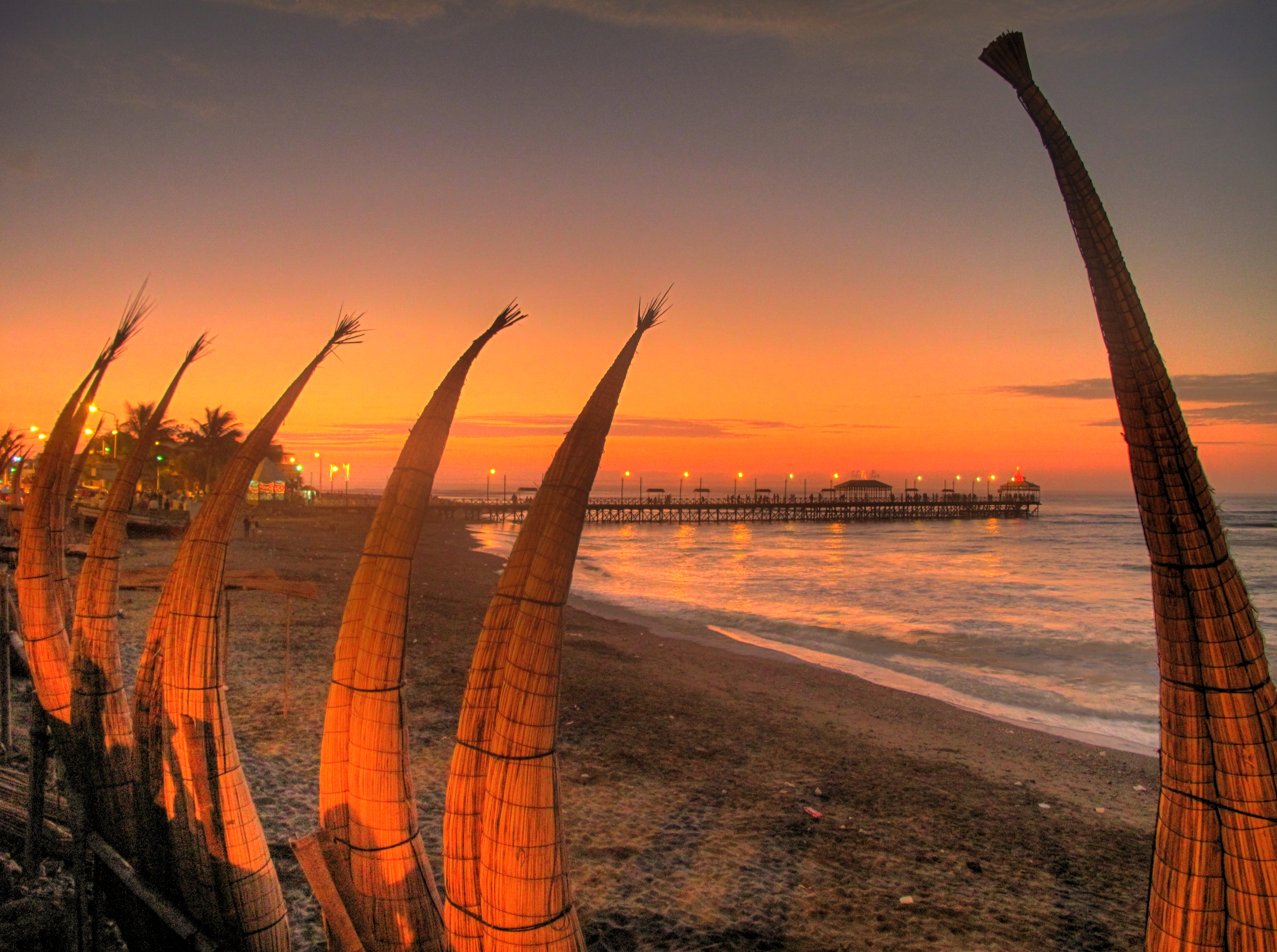 27 de Diciembre en Huanchaco, Trujillo (Perú)